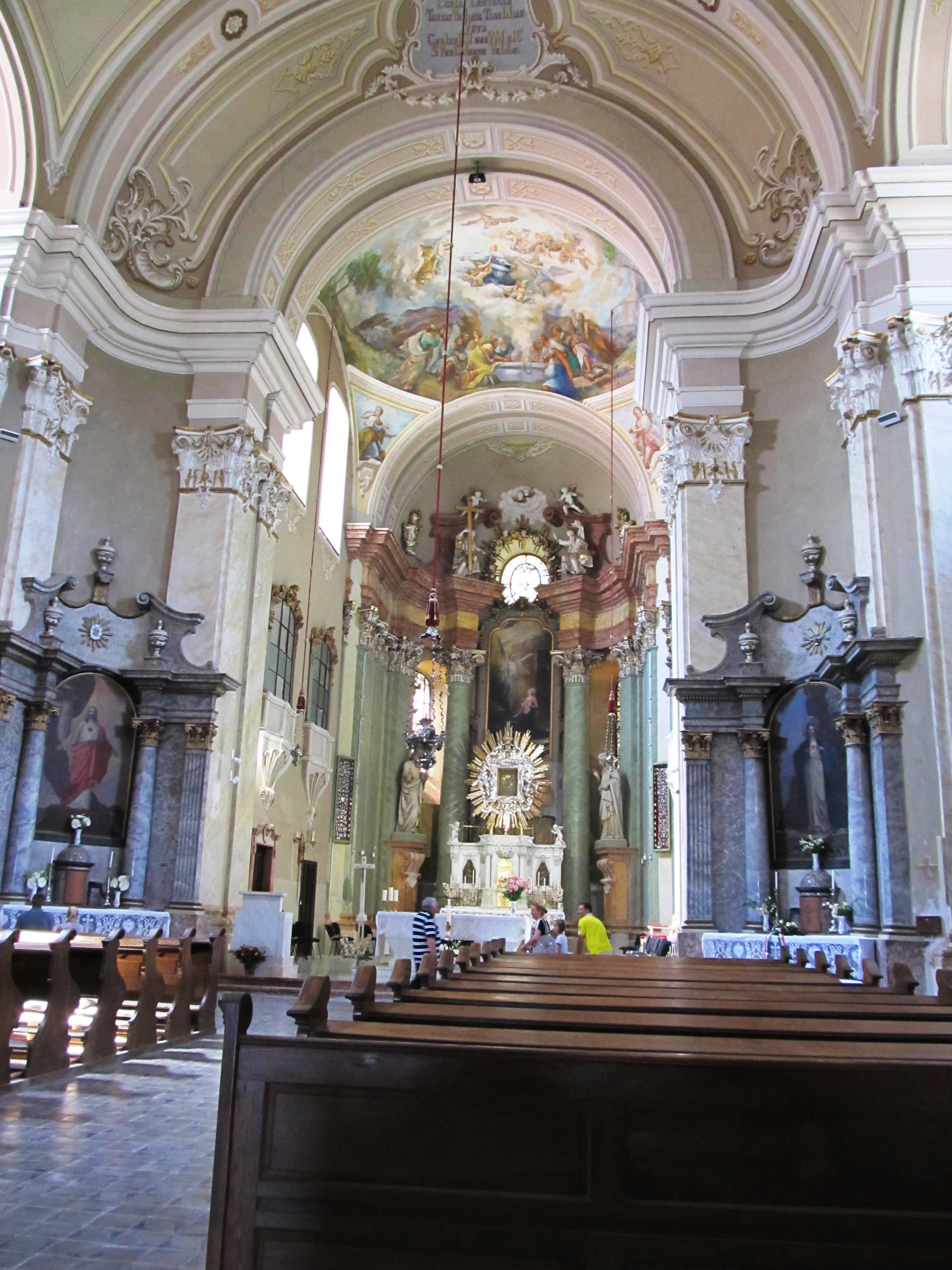 Innenansicht der Wallfahrtsbasilika Maria Radna in Lipova, Rumänien